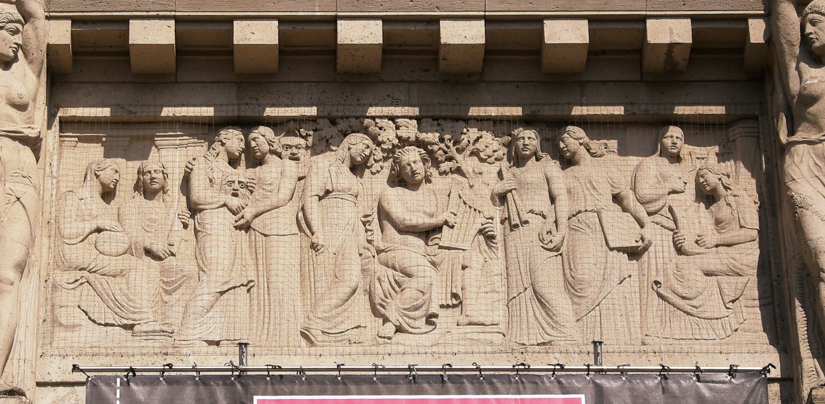 Apollo und die neuen Musen. Fries von Georg Roemer